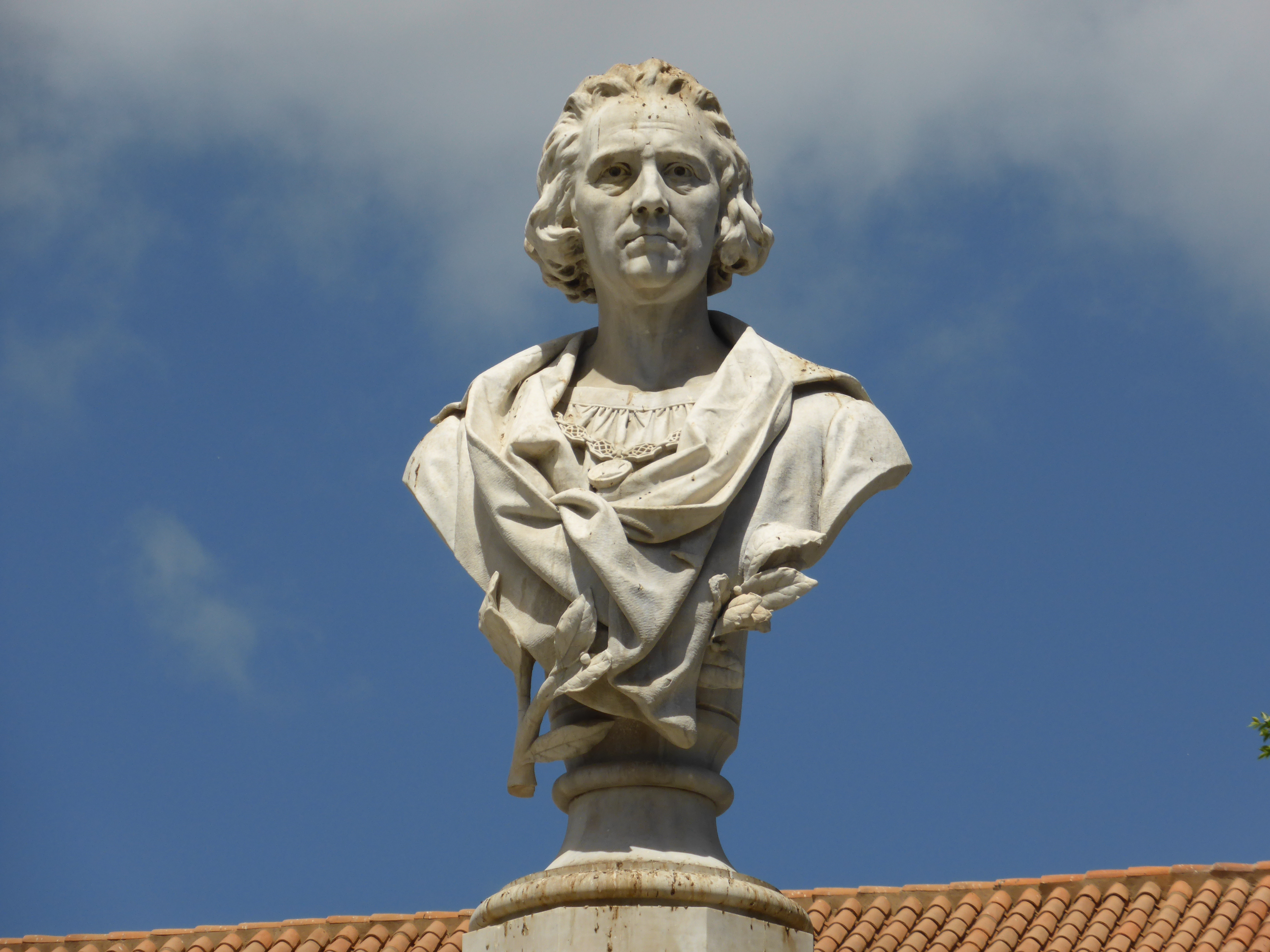 Monumento a Colón, en mármol, en la Alameda de Colón, en el barrio de Triana, de la ciudad de Las Palmas de Gran Canaria. Obra atribuida al taller del escultor italiano Paolo Triscornia di Ferdinando.